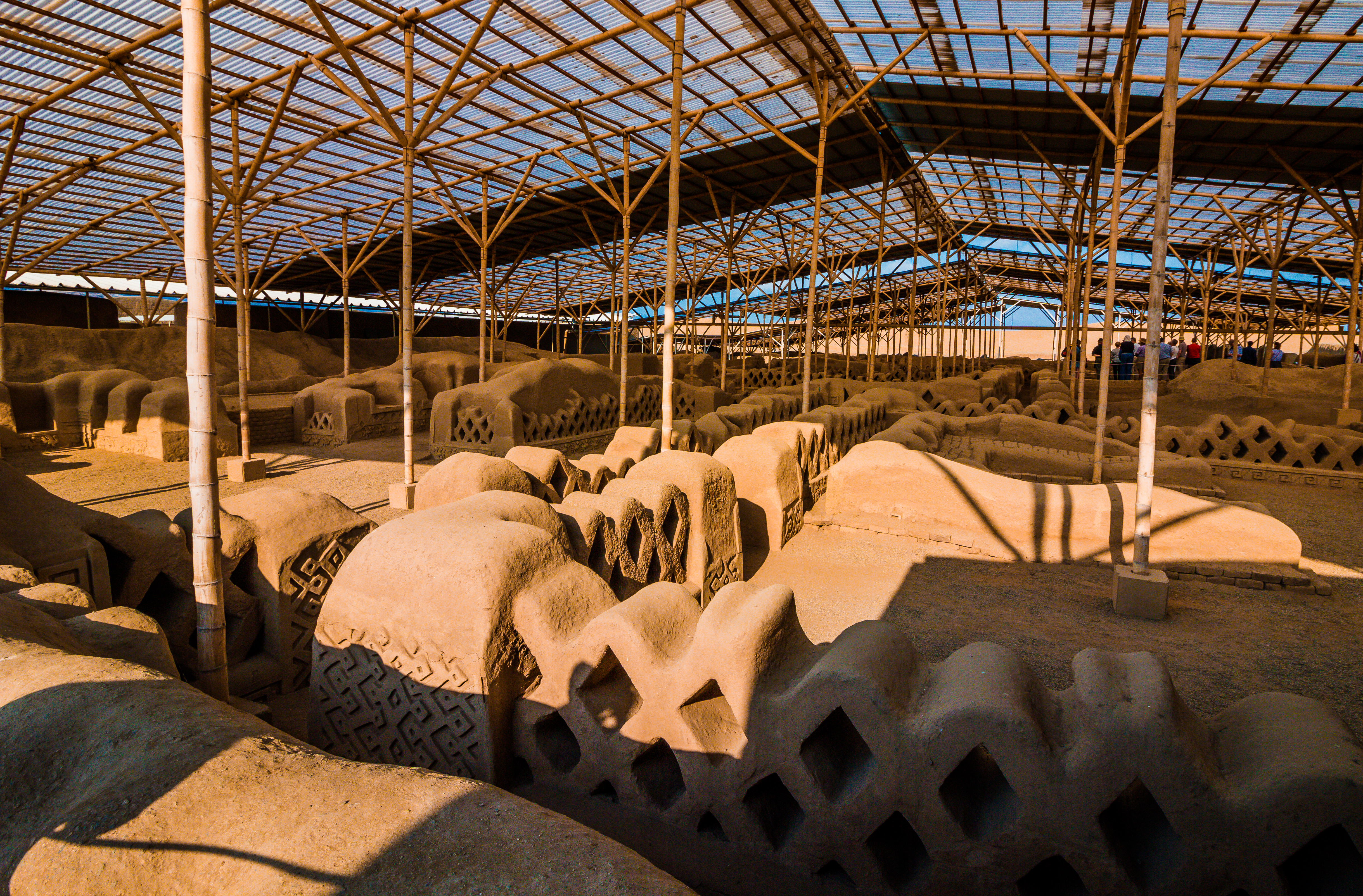 Trujillo, La Libertad, Perú